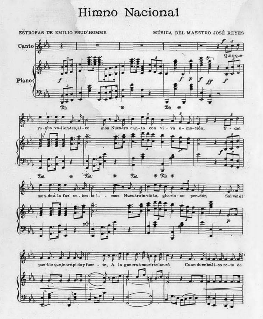 Partitura para Canto y piano del Himno Nacional